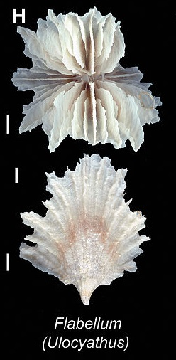 Recorte de ZooKeys